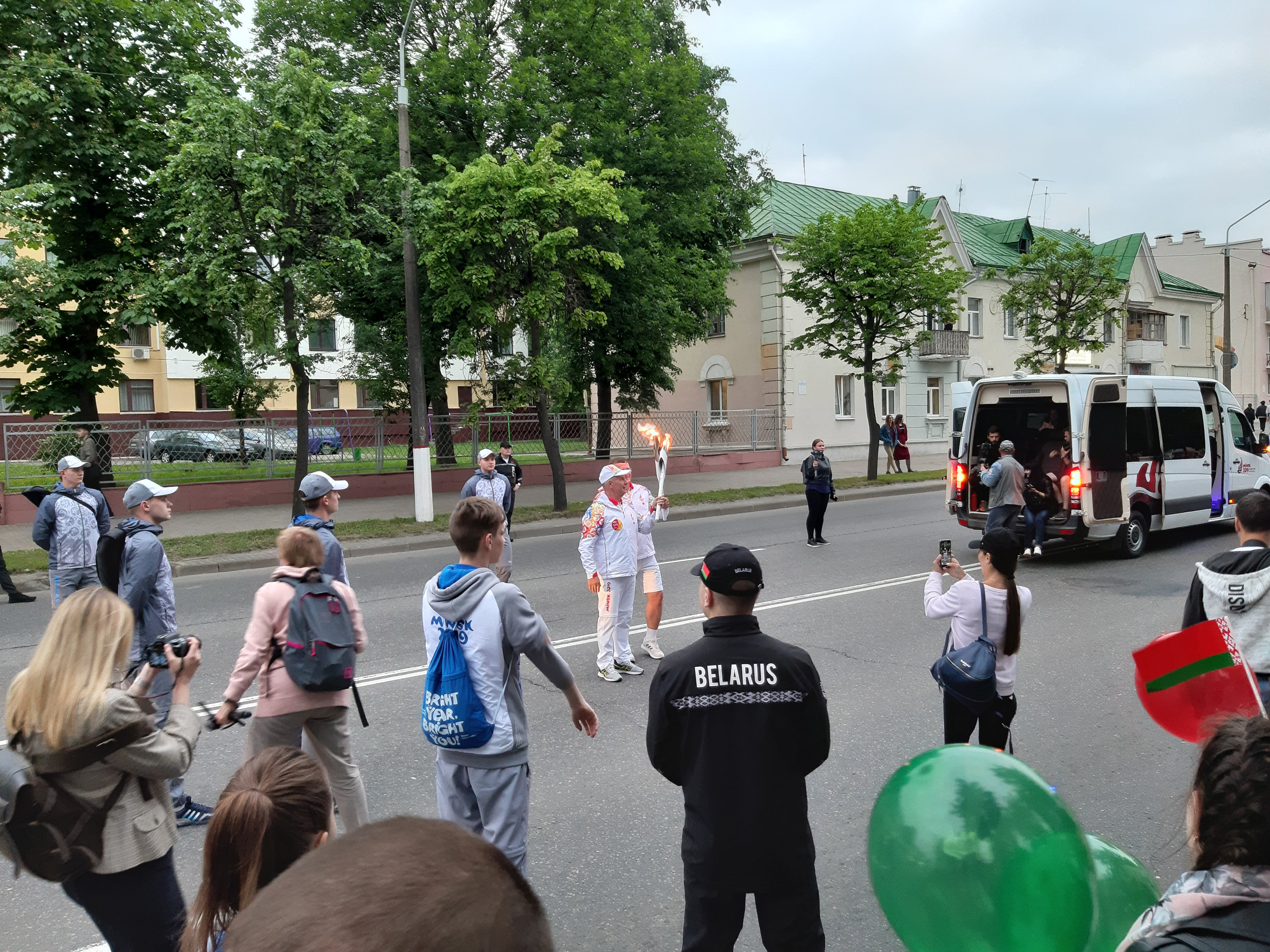 Магілёў. Эстафета агню Еўрапейскіх гульняў 2019